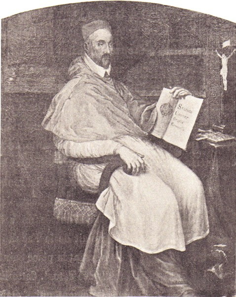 Portrait de Charles, cardinal de Lorraine.